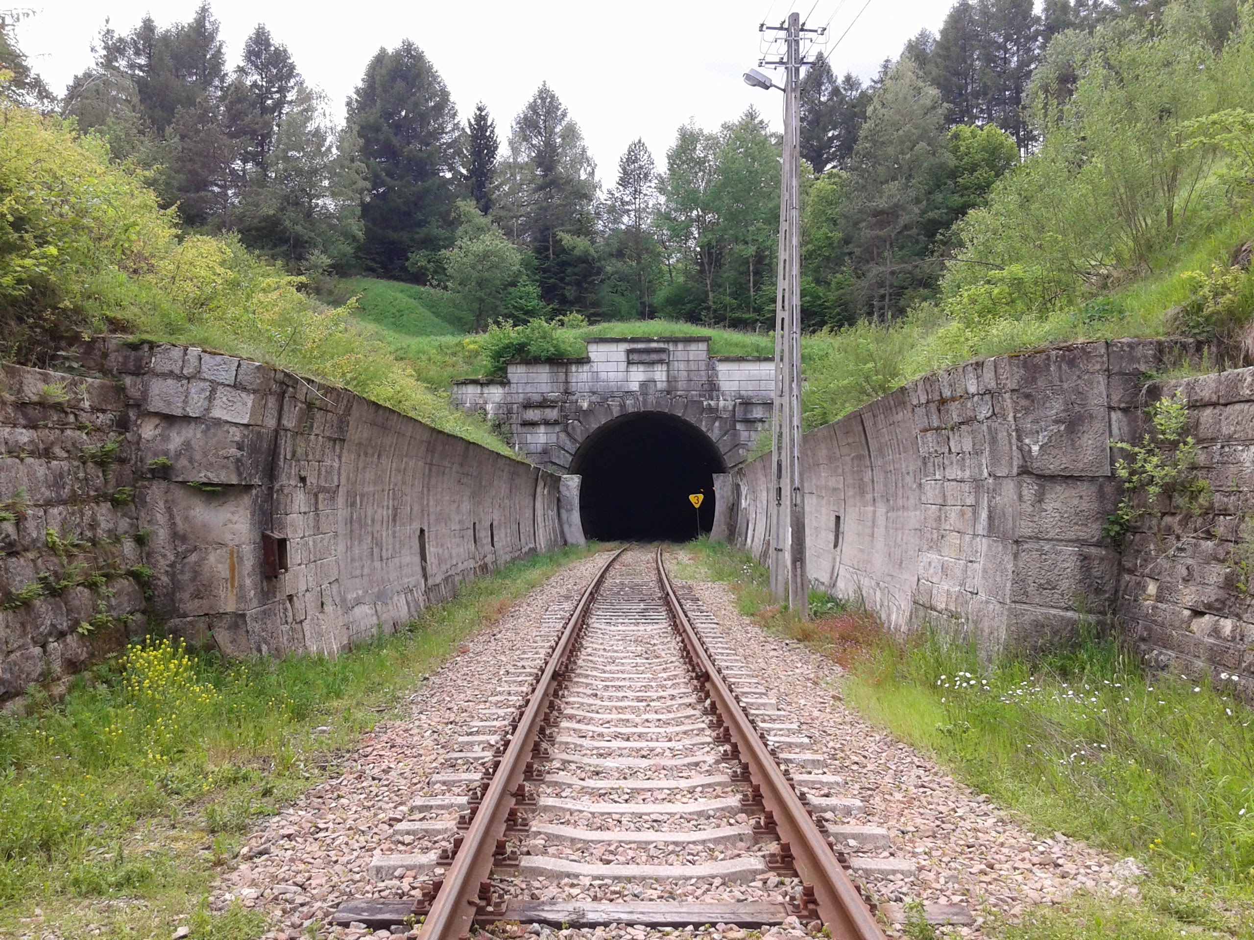 Wlot od strony Polski